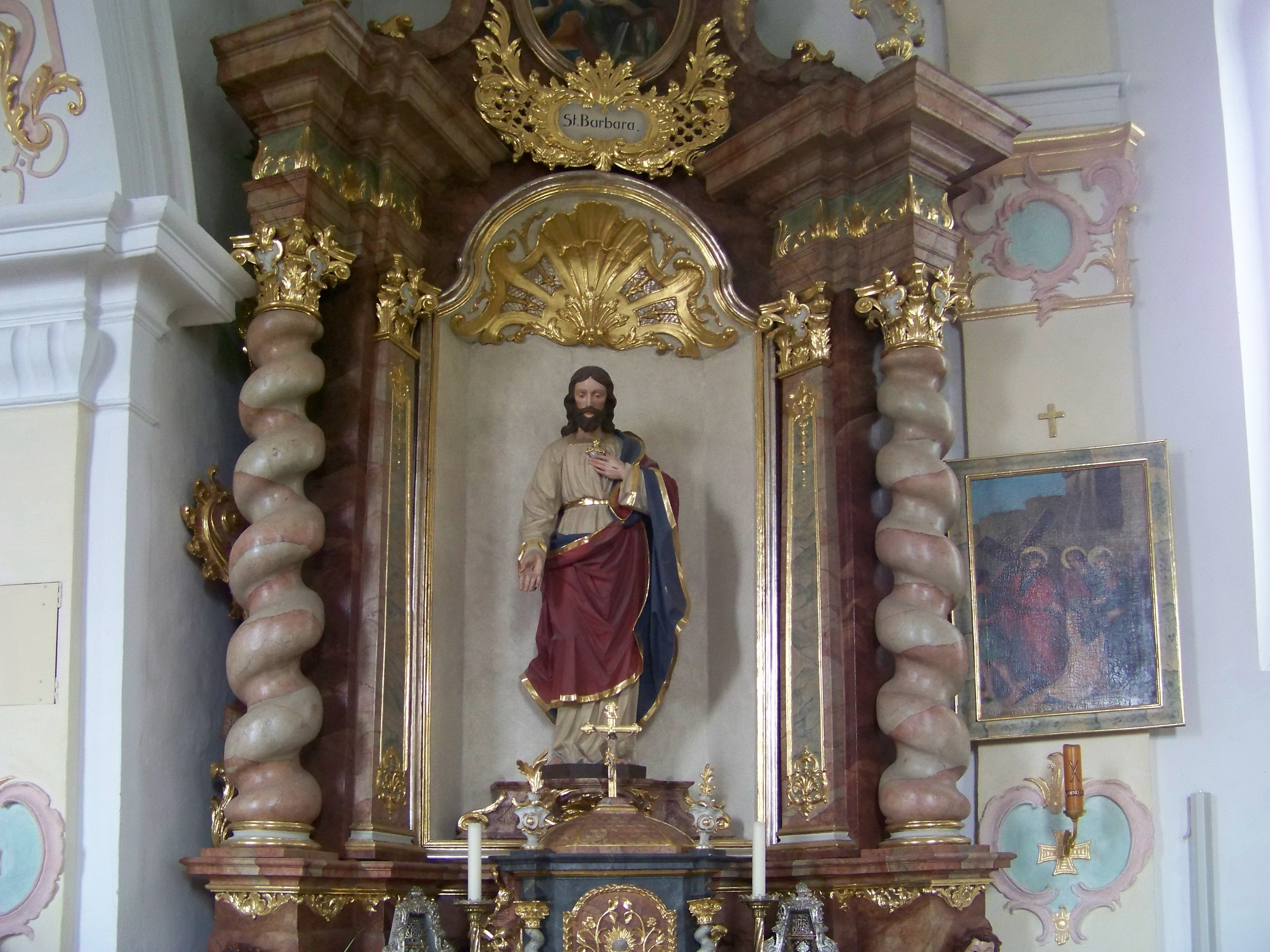 Langquaid Marktplatz 14. Katholische Pfarrkirche St. Jakob d. Ä. Saalkirche mit Steildach, eingezogenem Rechteckchor und Chorscheitelturm, Portalvorhalle nach Süden, Chor und Turm im Kern romanisch, 13. Jahrhundert, Langhaus spätgotisch, 15. Jahrhundert, Barockisierung der Anlage um 1740, Verlängerungen nach Westen, 1917 und 2004; mit Ausstattung. Rechter Seitenaltar mit Herz-Jesu Figur zwischen gewundenen Säulen.